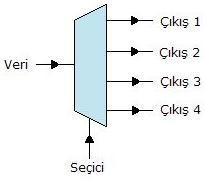 Engin Özger tarafından resmedilmiştir. Tüm hakları kamuya bağışlanmıştır